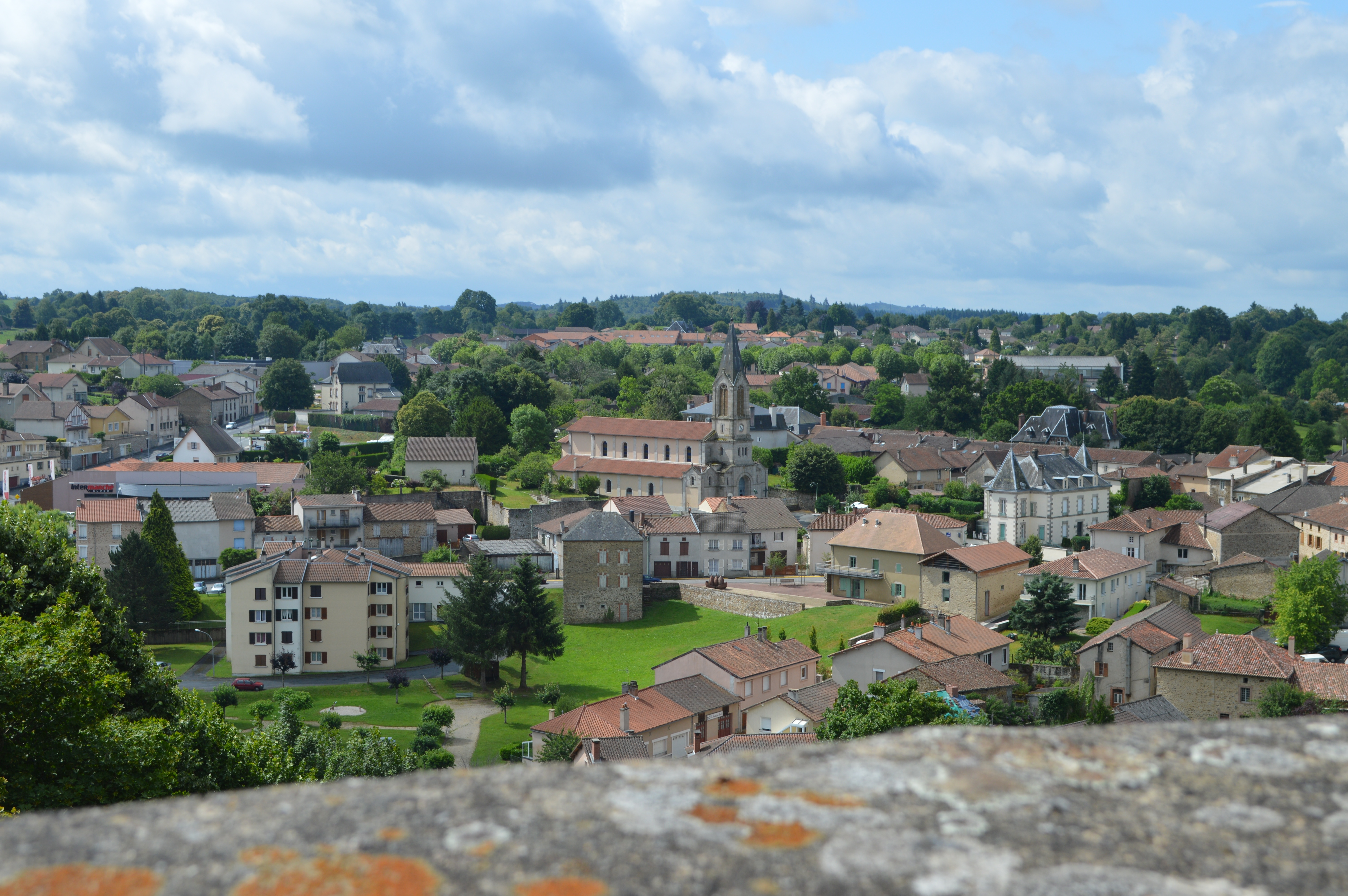 Overlooking Chalus